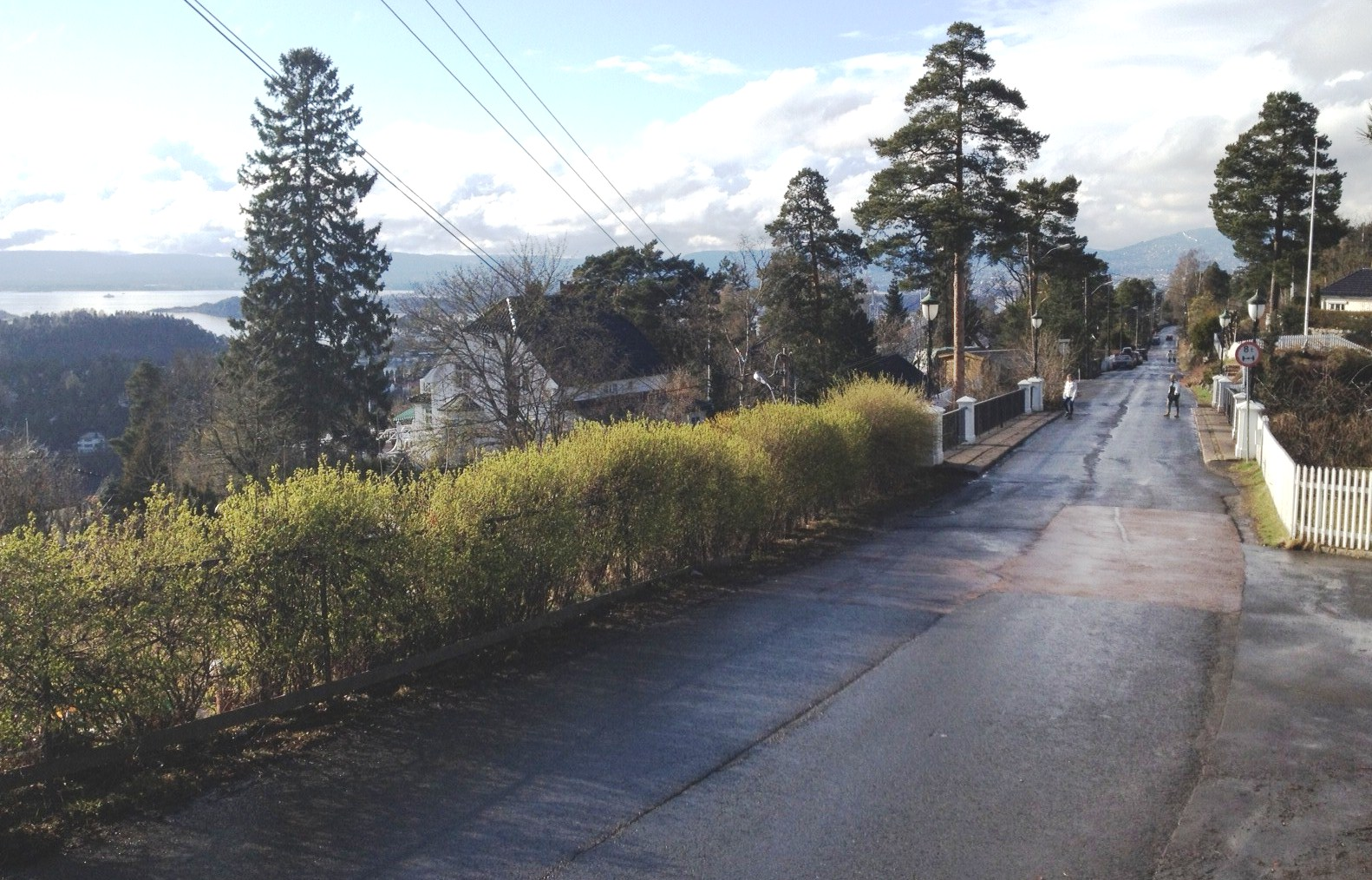 Solveien, Oslo